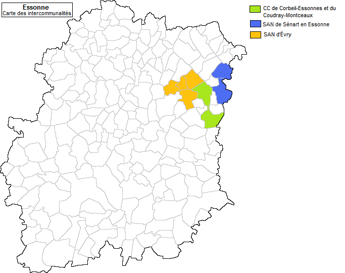 Carte des intercommunalités en Essonne en 1996.